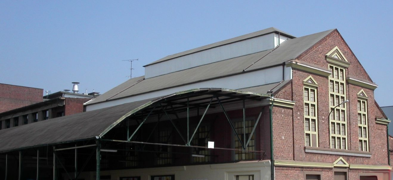 altes Gebäude der Stauderbrauerei in Essen